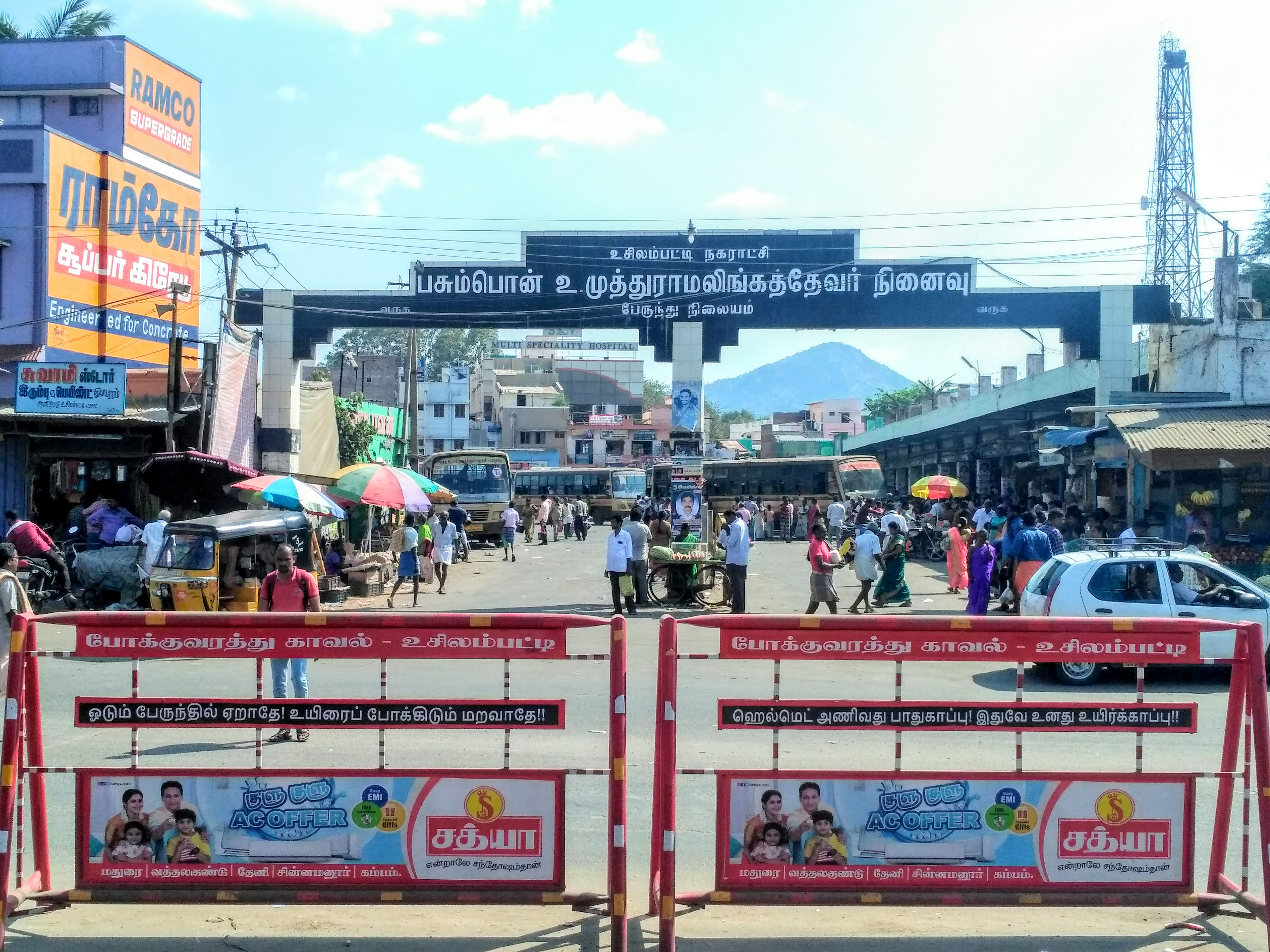 உசிலம்பட்டி பேருந்து நிலையம்